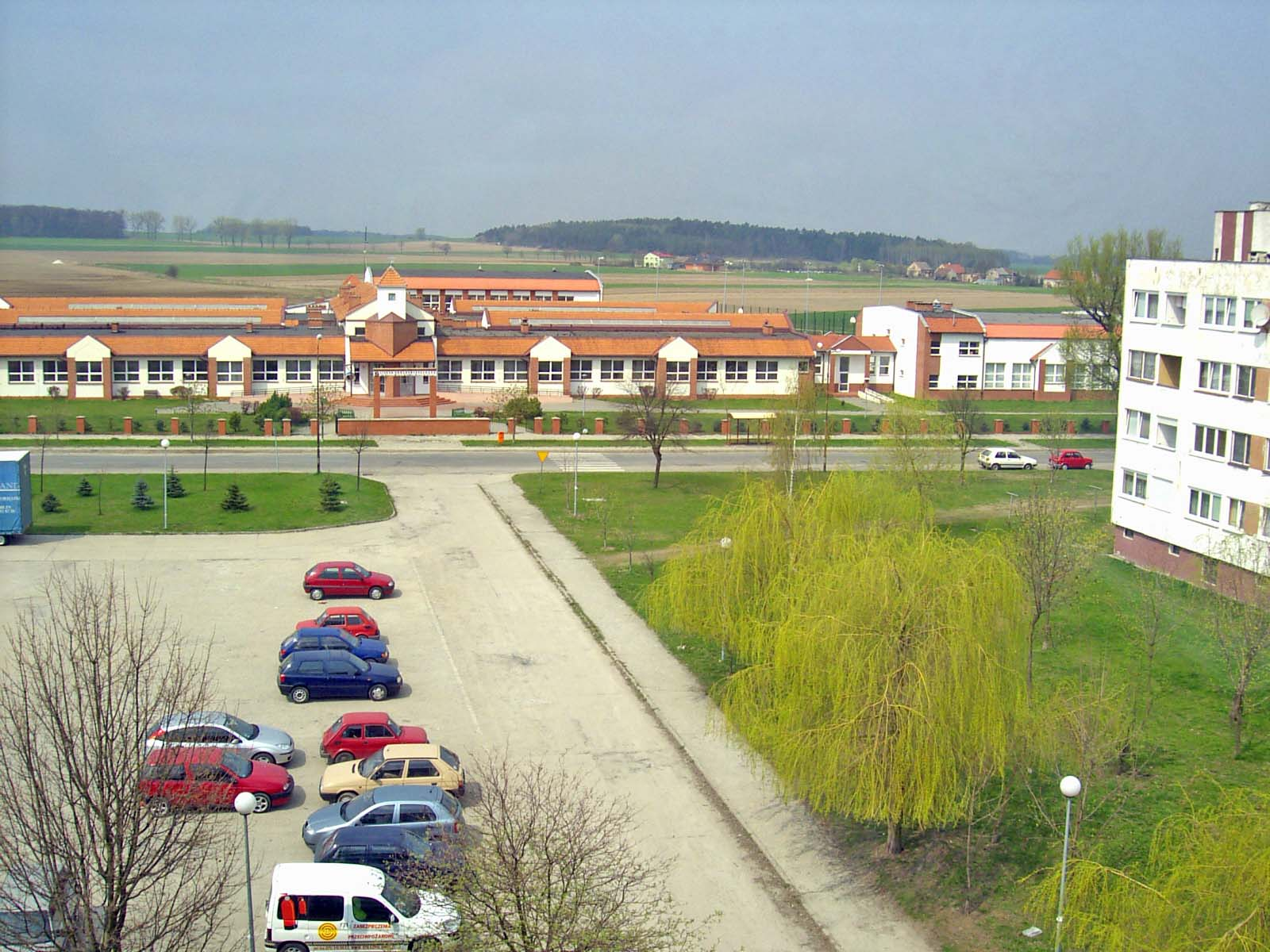 Wiosna w Polsce.